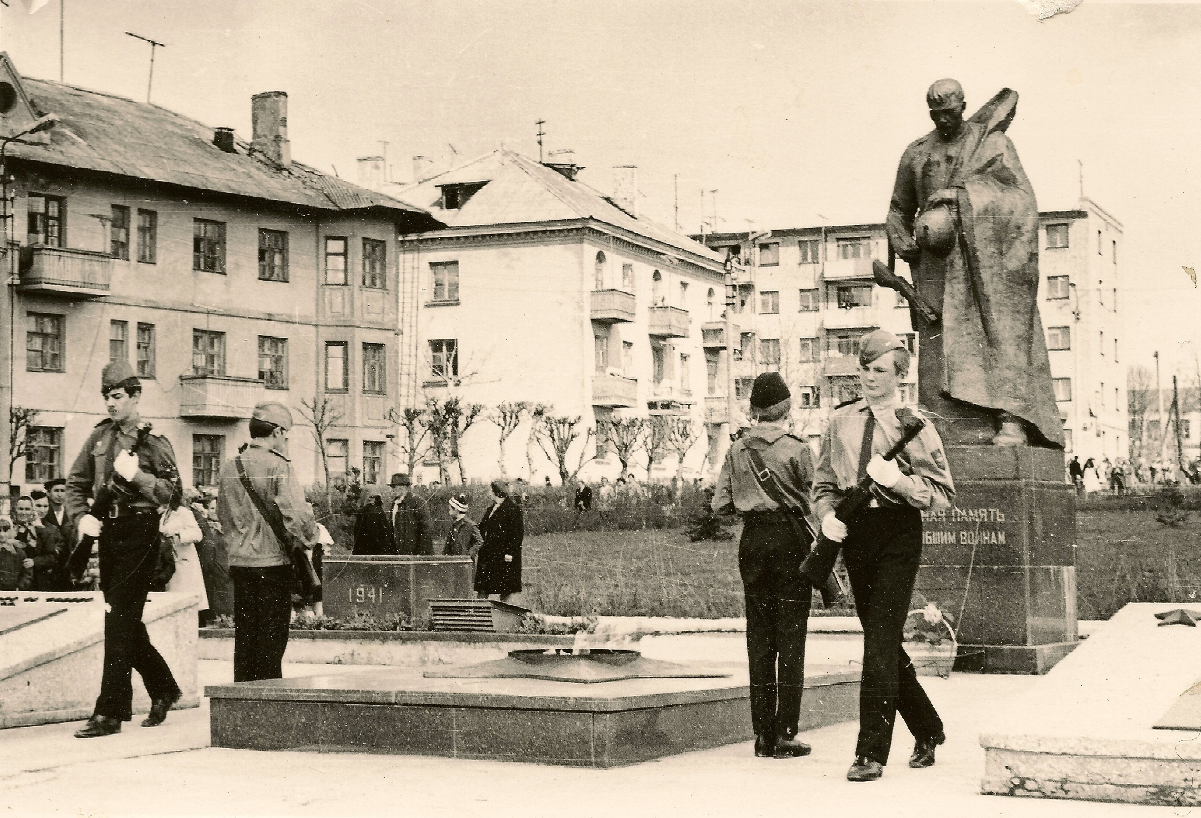 Ясногорск. Памятник Вечной славы героям-ясногорцам, павшим в боях на фронтах Великой Отечественной войны.